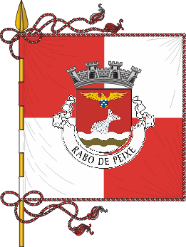 rp